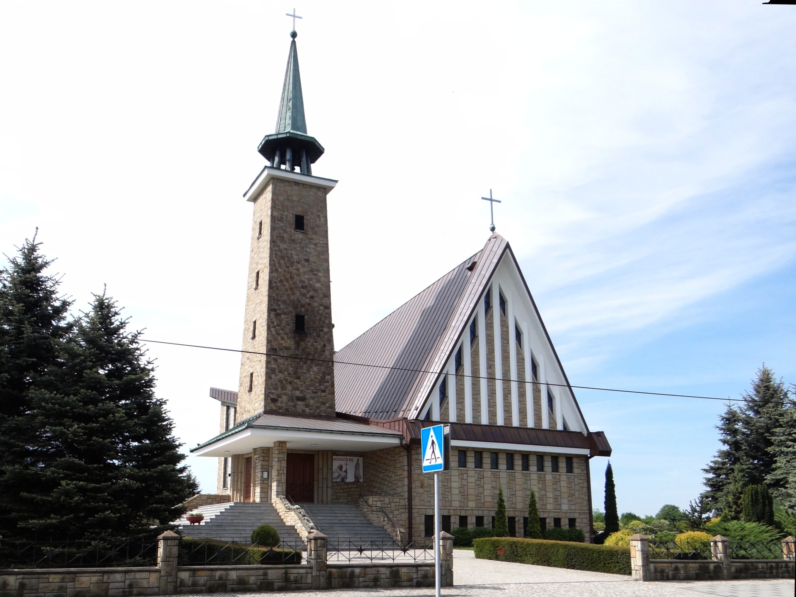 Kościół w Leszczynie